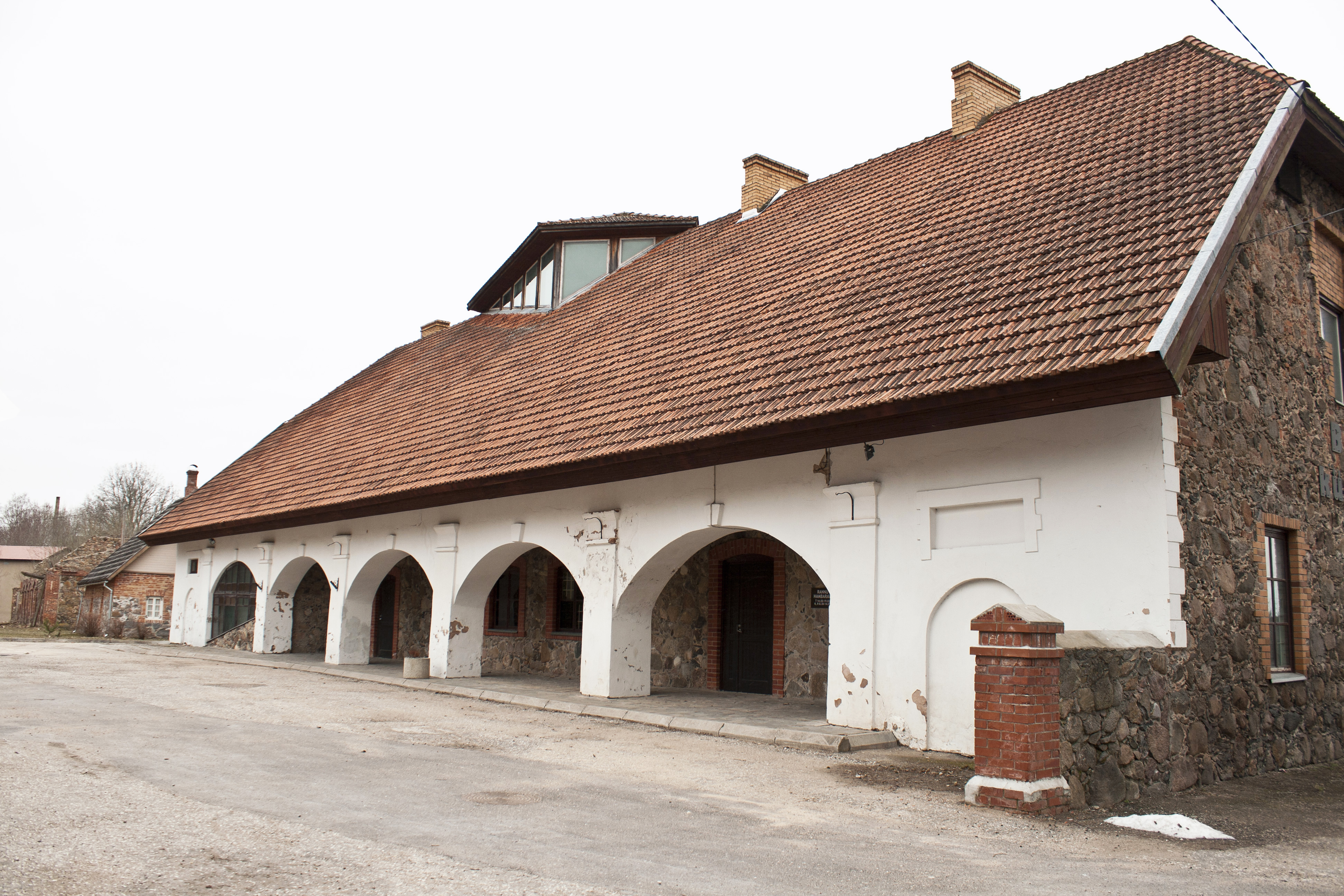 Rannu mõisa ait